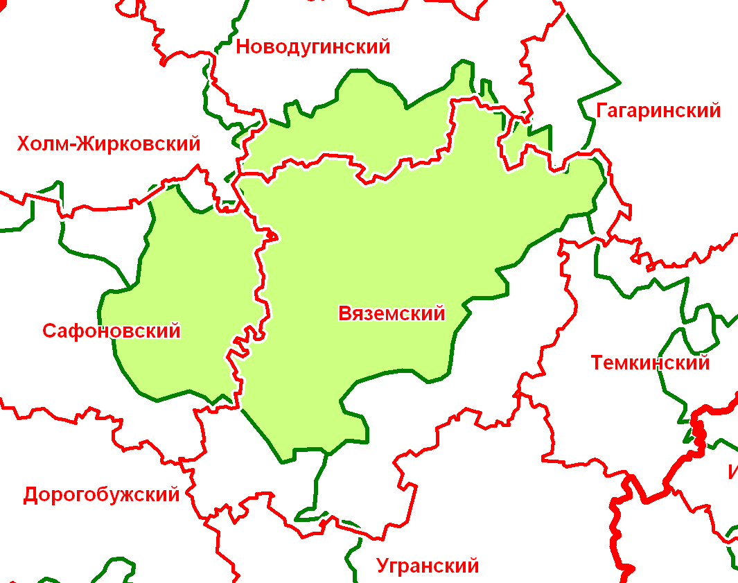 Вяземский уезд Смоленской губернии в современной сетке районов